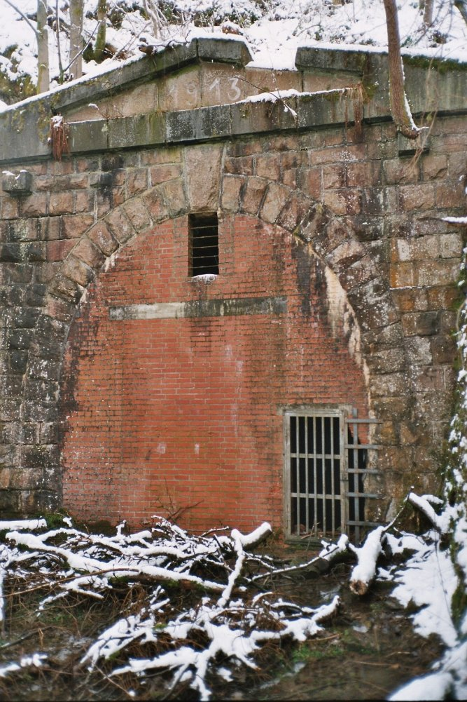 Das zugemauerte Westportal des Heinsberger Tunnels (die beiden Portale des Tunnels stehen unter Baudenkmalschutz) This is a photograph of an architectural monument.